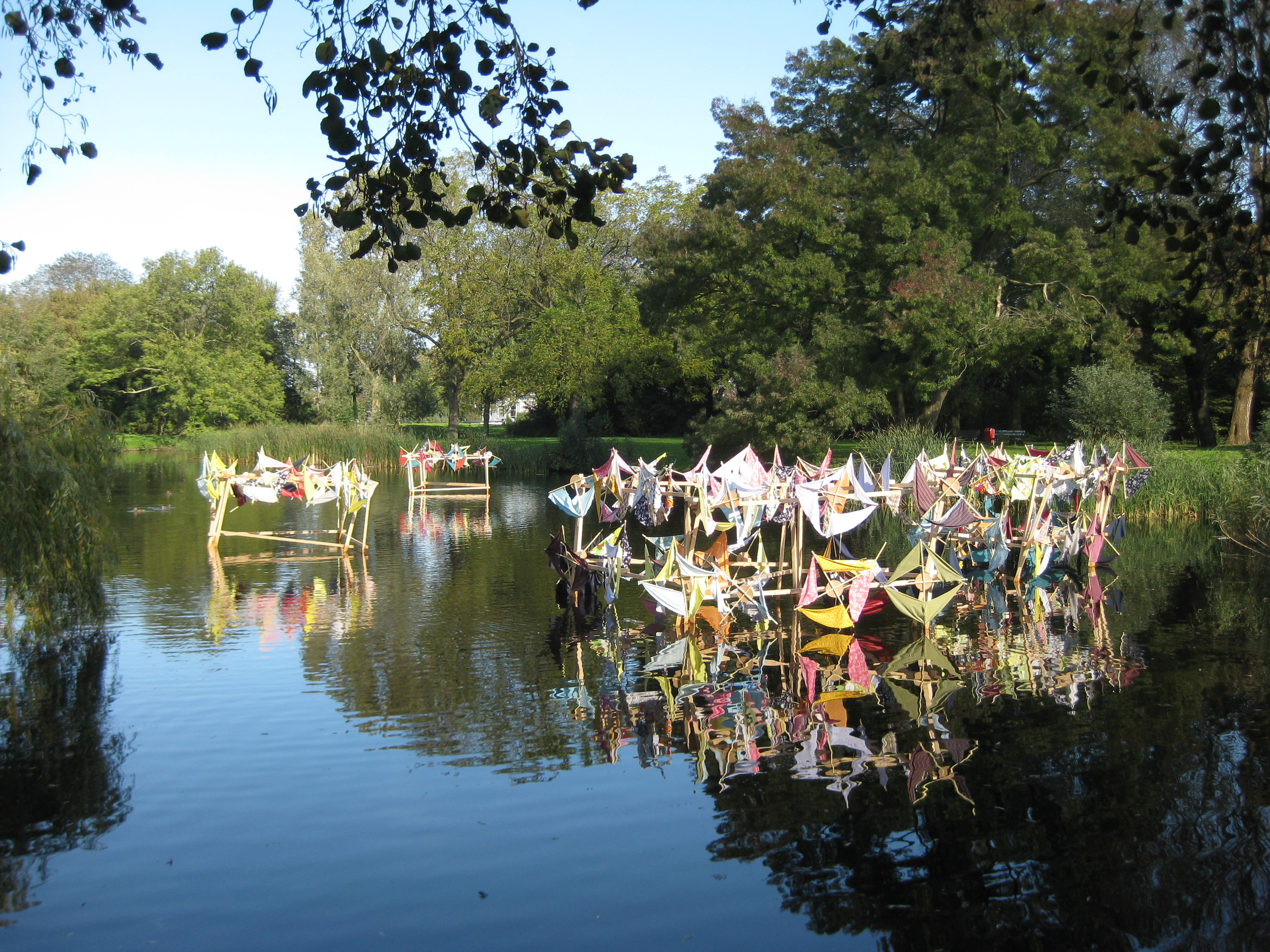 Woei en windmolenpark in de vijver van het Noorderpark in Amsterdam-Noord. Sjoukje Gootjes en Lobke Meekes en kinderen van basisscholen in Amsterdam-Noord.